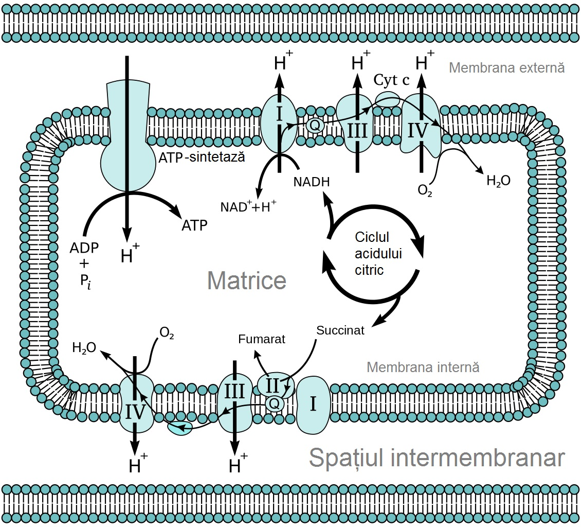 Lanțul trasportor de electroni